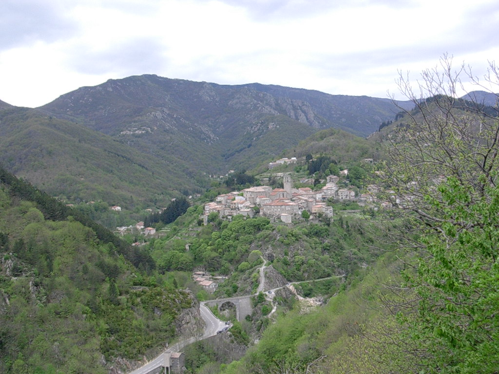 Village d'Antraigues surplombant le confluent de la Bise et de la Volane